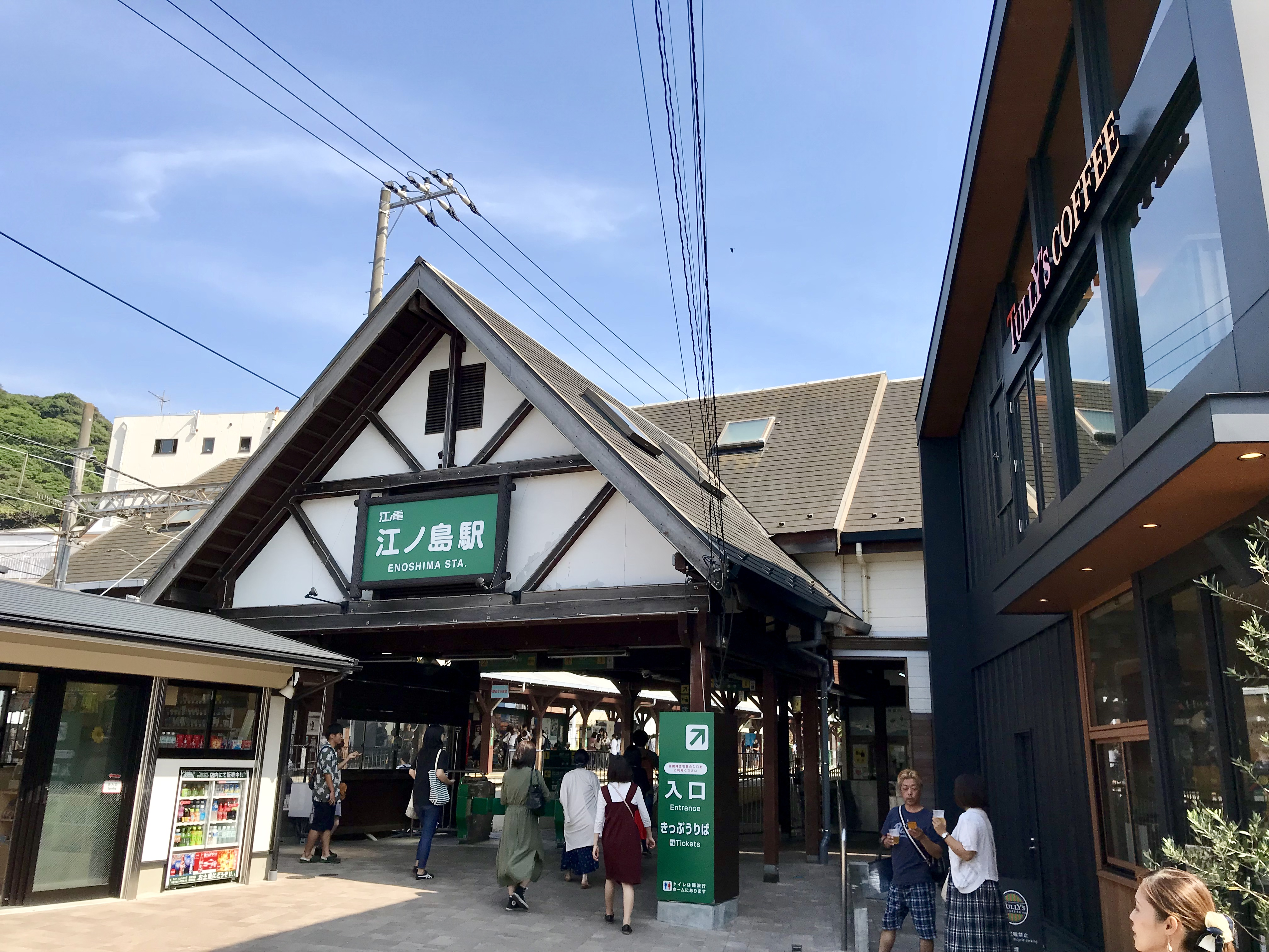 江ノ島電鉄江ノ島駅駅舎（2018年）